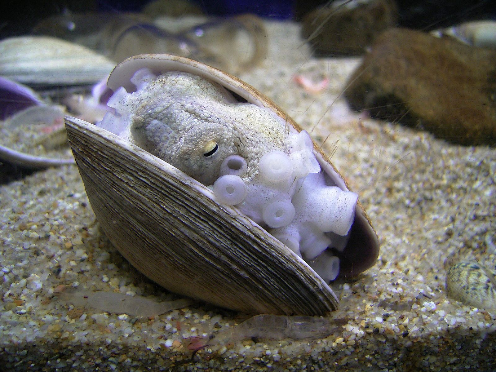 at Suma aquarium, KOBE イイダコです。